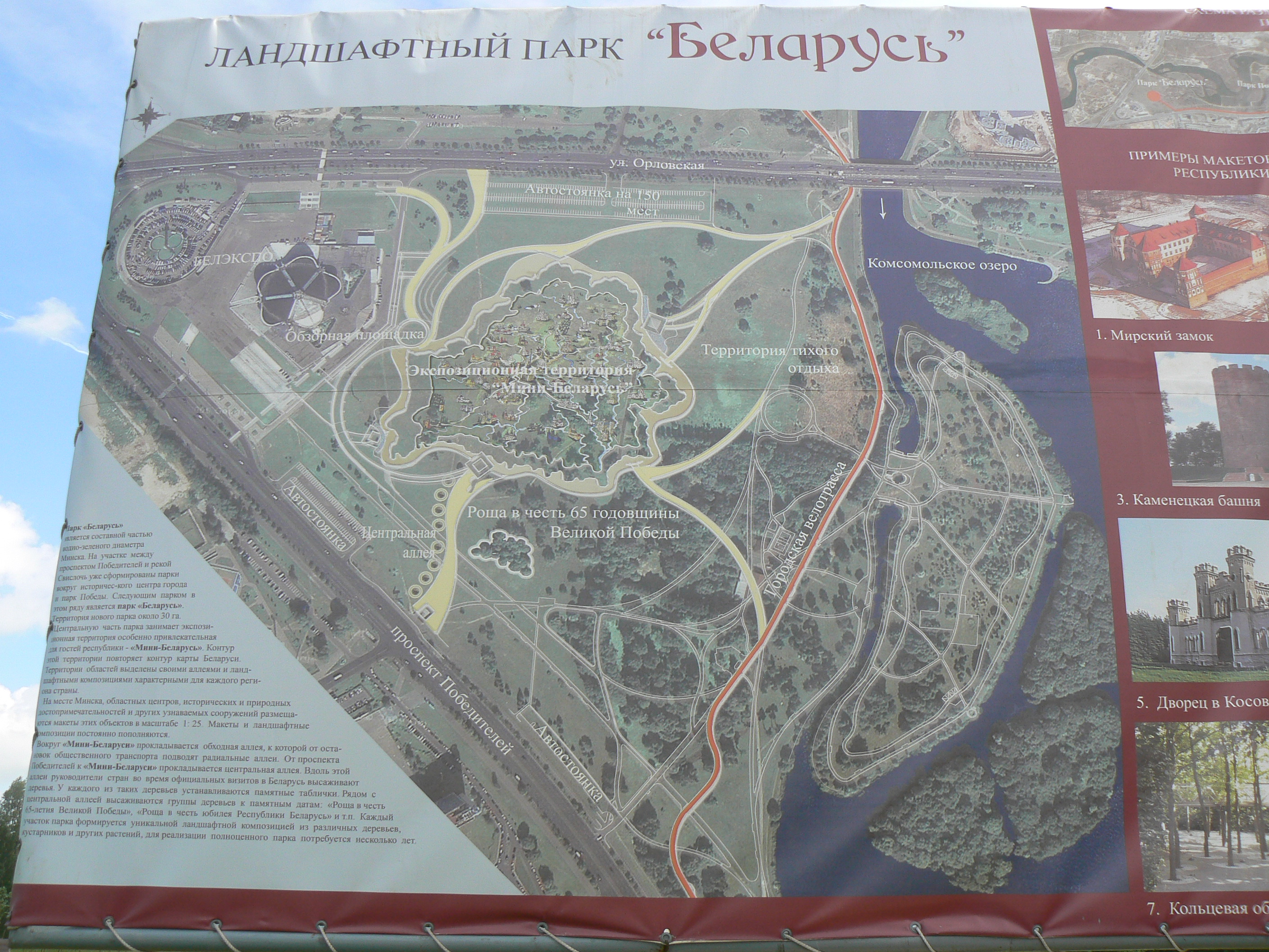 Ландшафный парк "Беларусь"